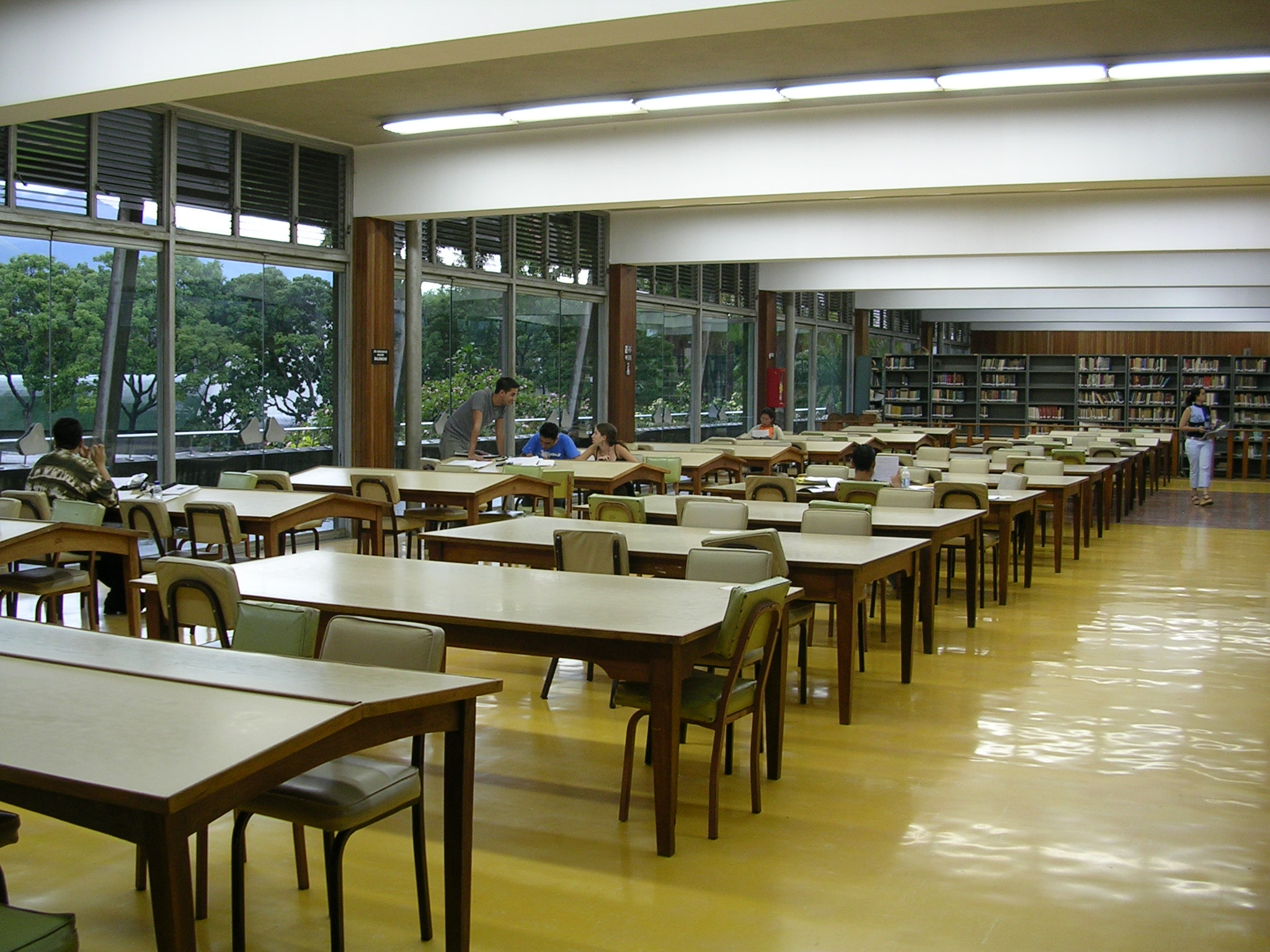 Biblioteca Central de la Universidad Central de Venezuela, Caracas. Photo by Caracas1830 (2005)